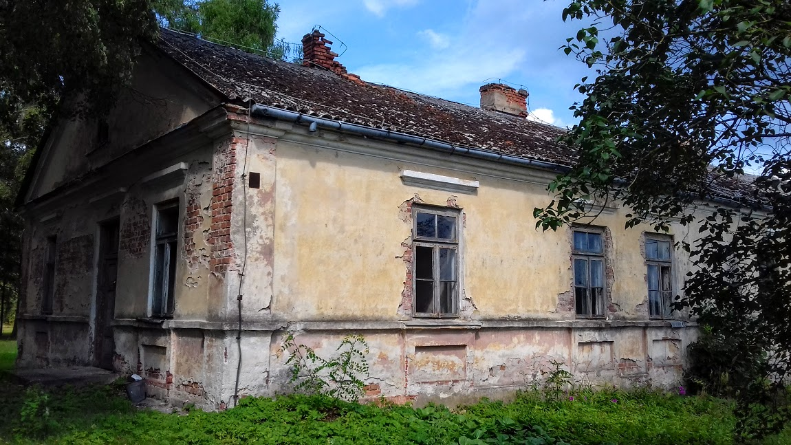 Kamieniec - oficyna w zespole dworskim, obecnie szkoła, 2 poł. XIX